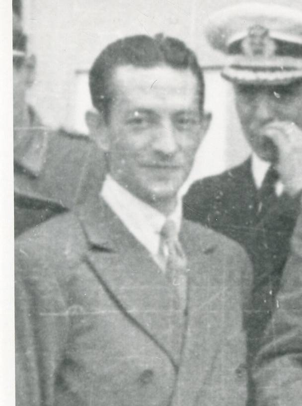 Mandos militares españoles en una estación